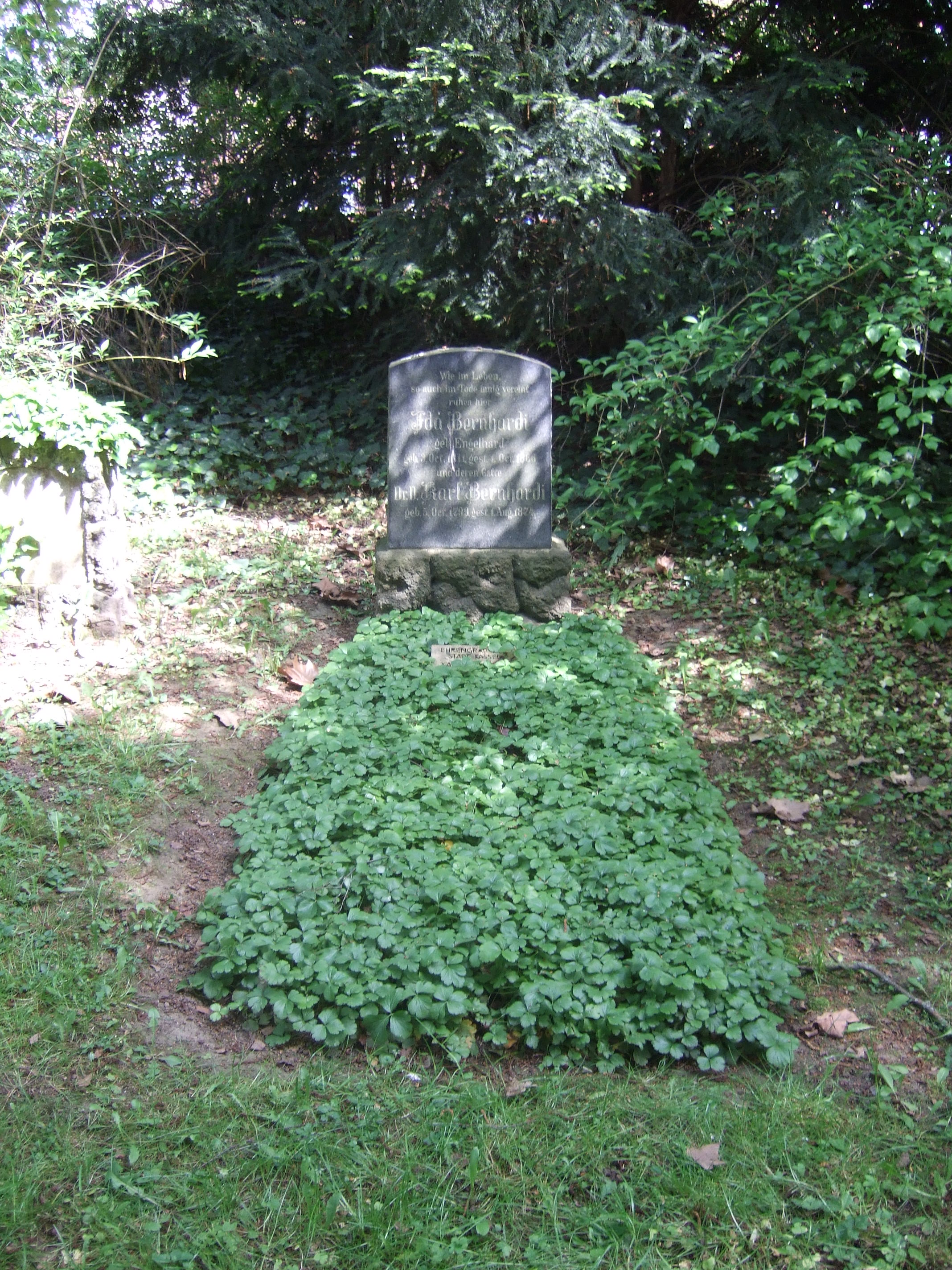 Grab von Karl Bernhardi auf dem Hauptfriedhof Kassel.